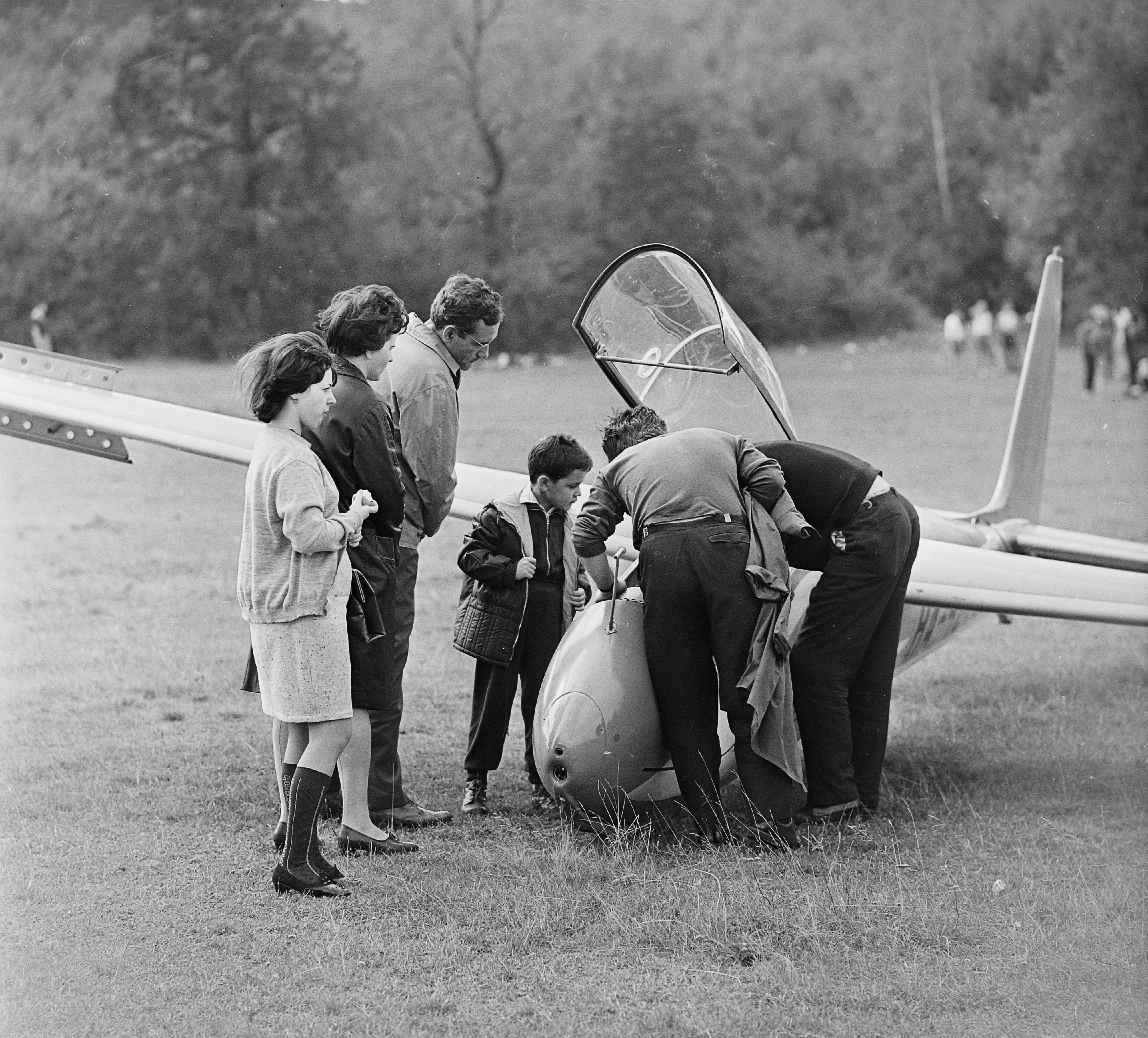 SZD-22C Mucha vitorlázó repülőgép. Location: Hungary, Budapest II., Hármashatárhegy Airport Tags: airport, airplane, sailplane, Budapest Title: SZD-22C Mucha vitorlázó repülőgép.